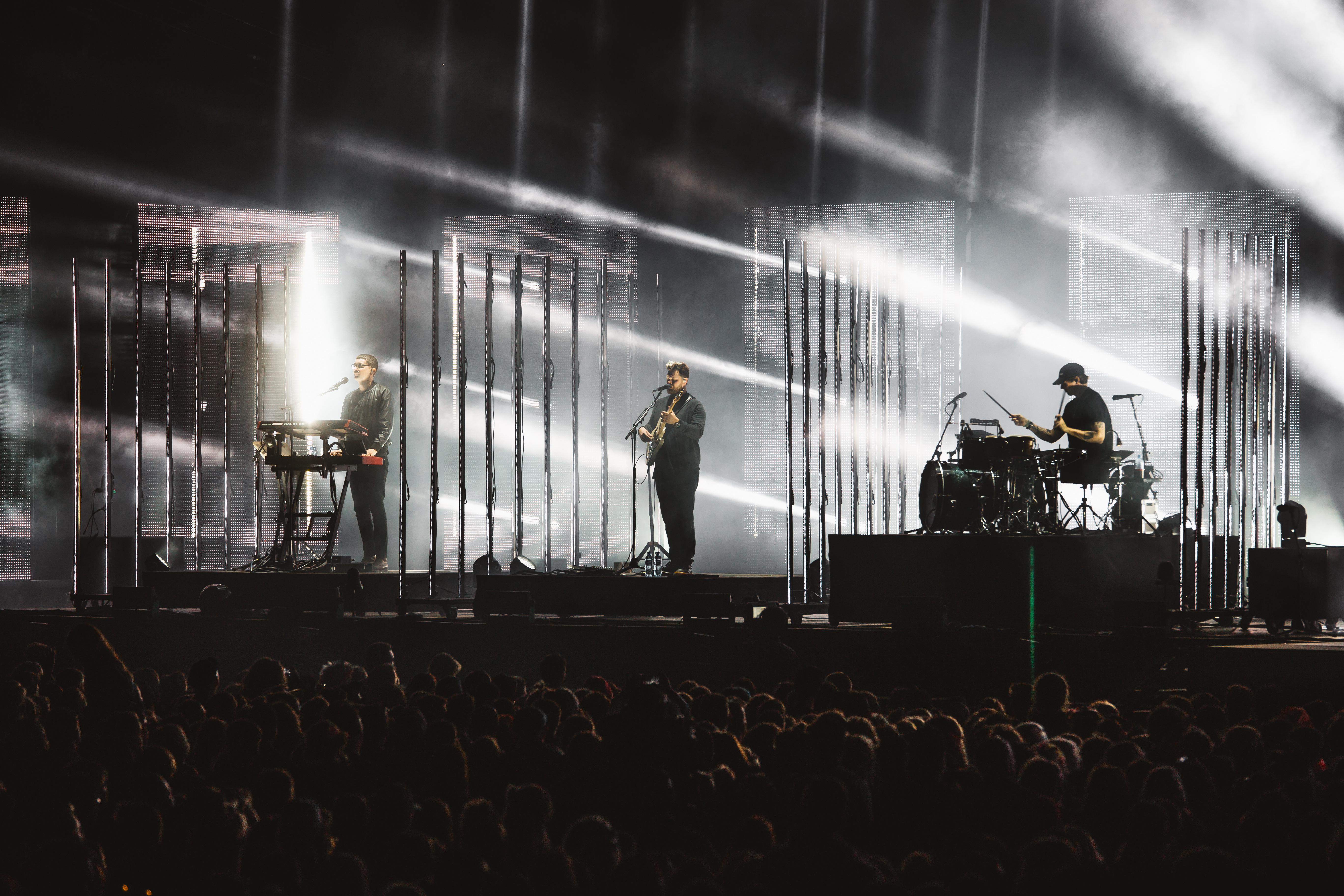 Photo: Krists Luhaers // @Kristsll